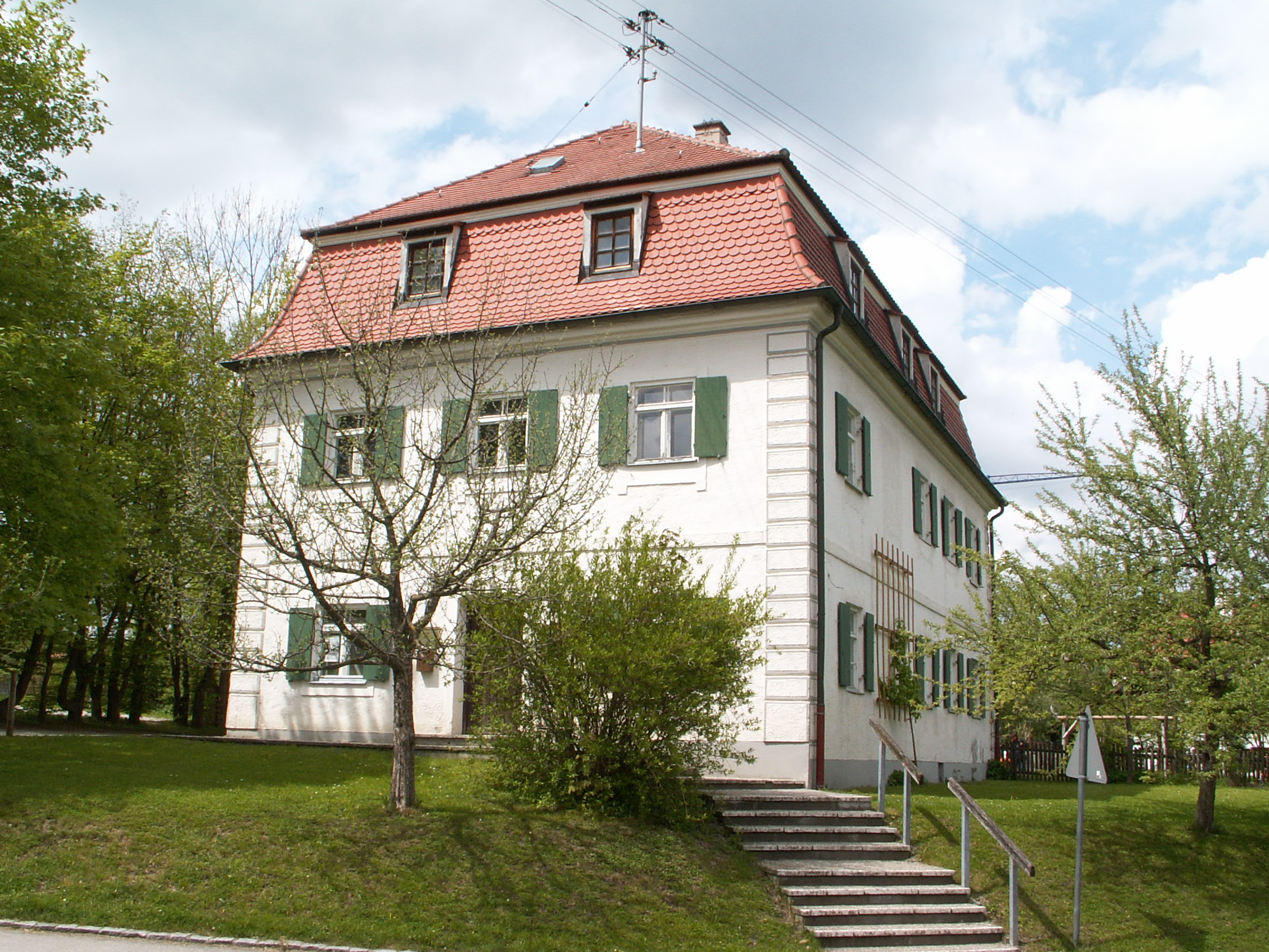 Pfarrhof in Rott